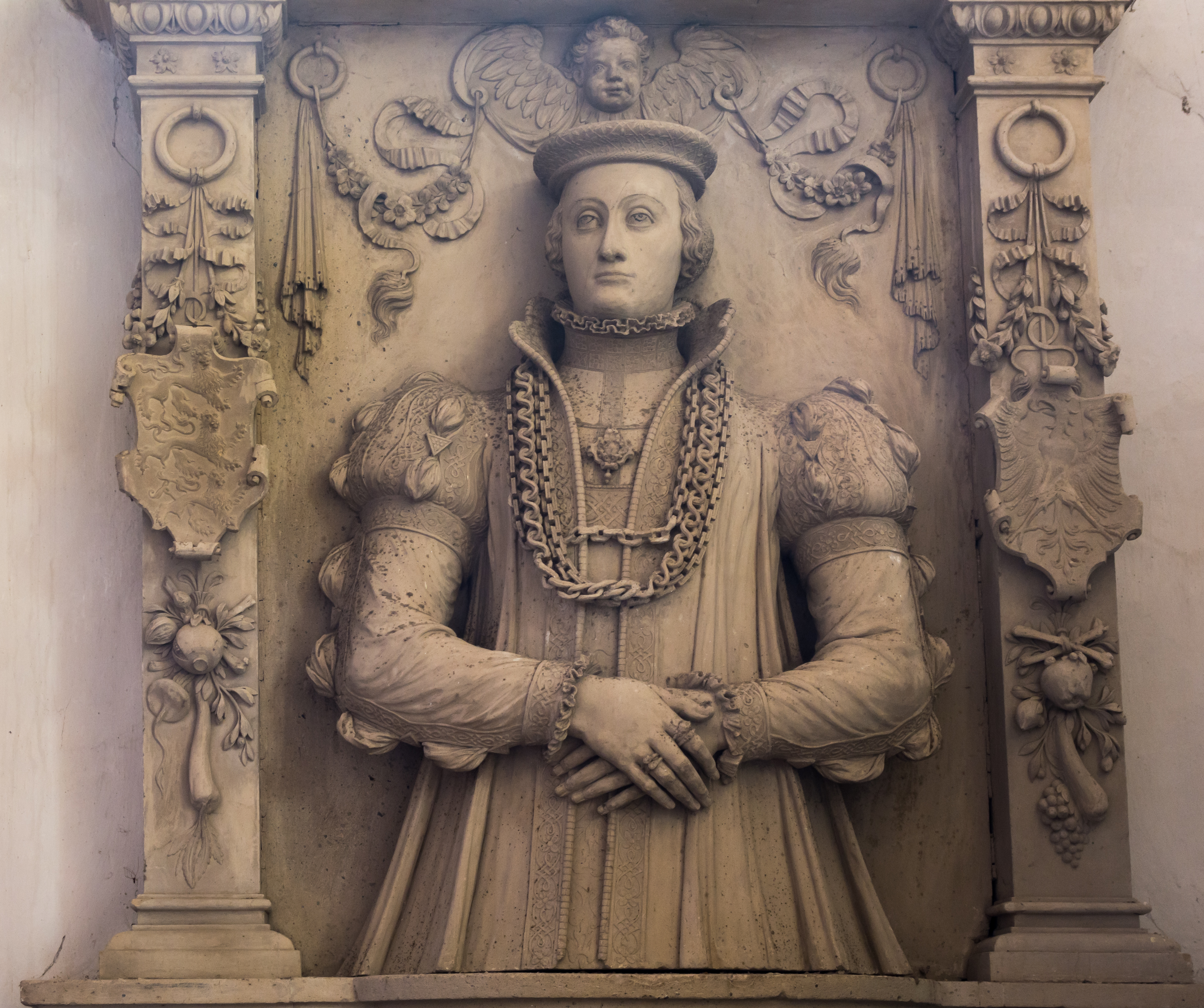 Cenotaaf voor Maria Jacobea van Oettingen, aangebracht op de zuidelijke wand van de Anna-kapel in de Stephanskirche. Tufsteen, 1558/59.